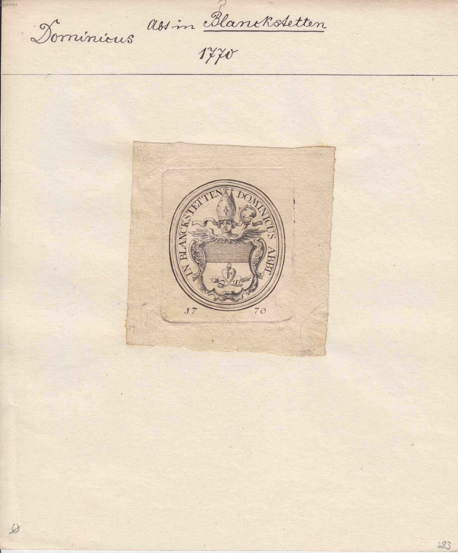 Exlibris - Abt Dominicus Fleischmann - Kloster Plankstetten